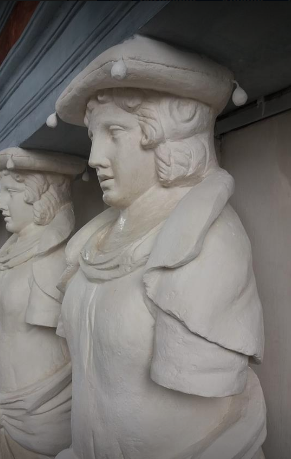 après retauration 2018